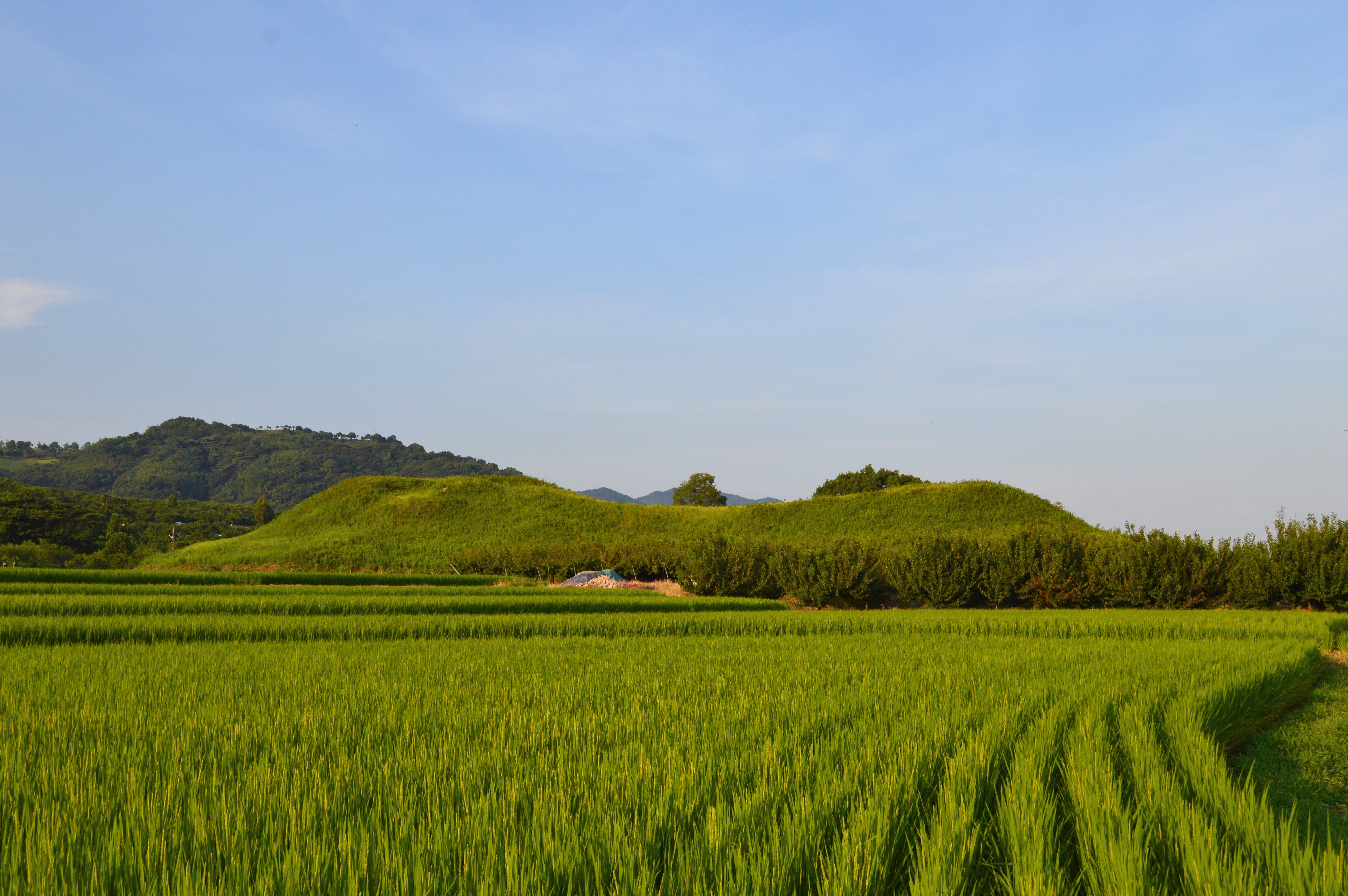 船塚古墳 (佐賀市) 遠景